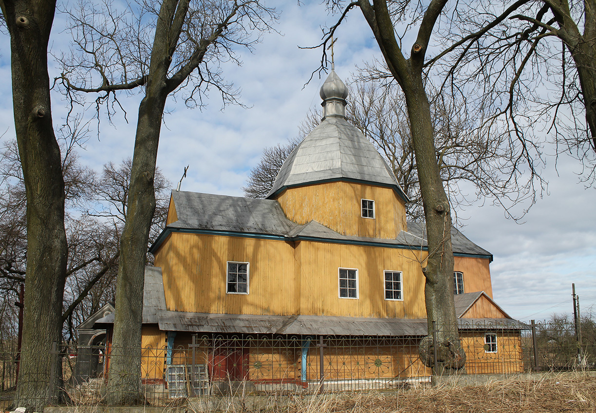 Дерев'яна церква Св. Юрія, 1892 р., с. Ниновичі